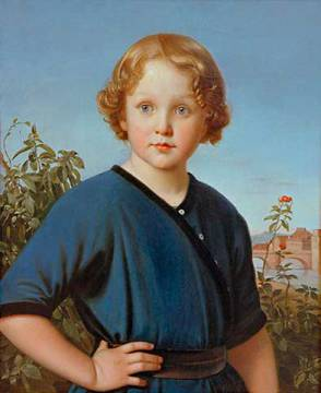 "Knabenbildnis", um 1840. Öl auf Leinwand, 64,5 x 53,5 cm.